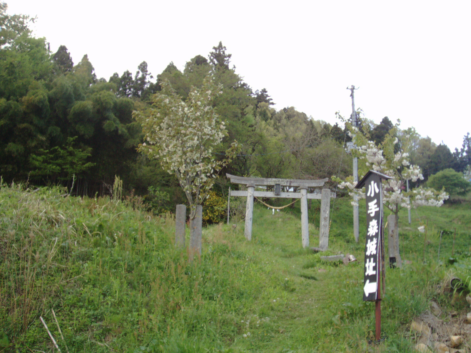 小手森城大手口.